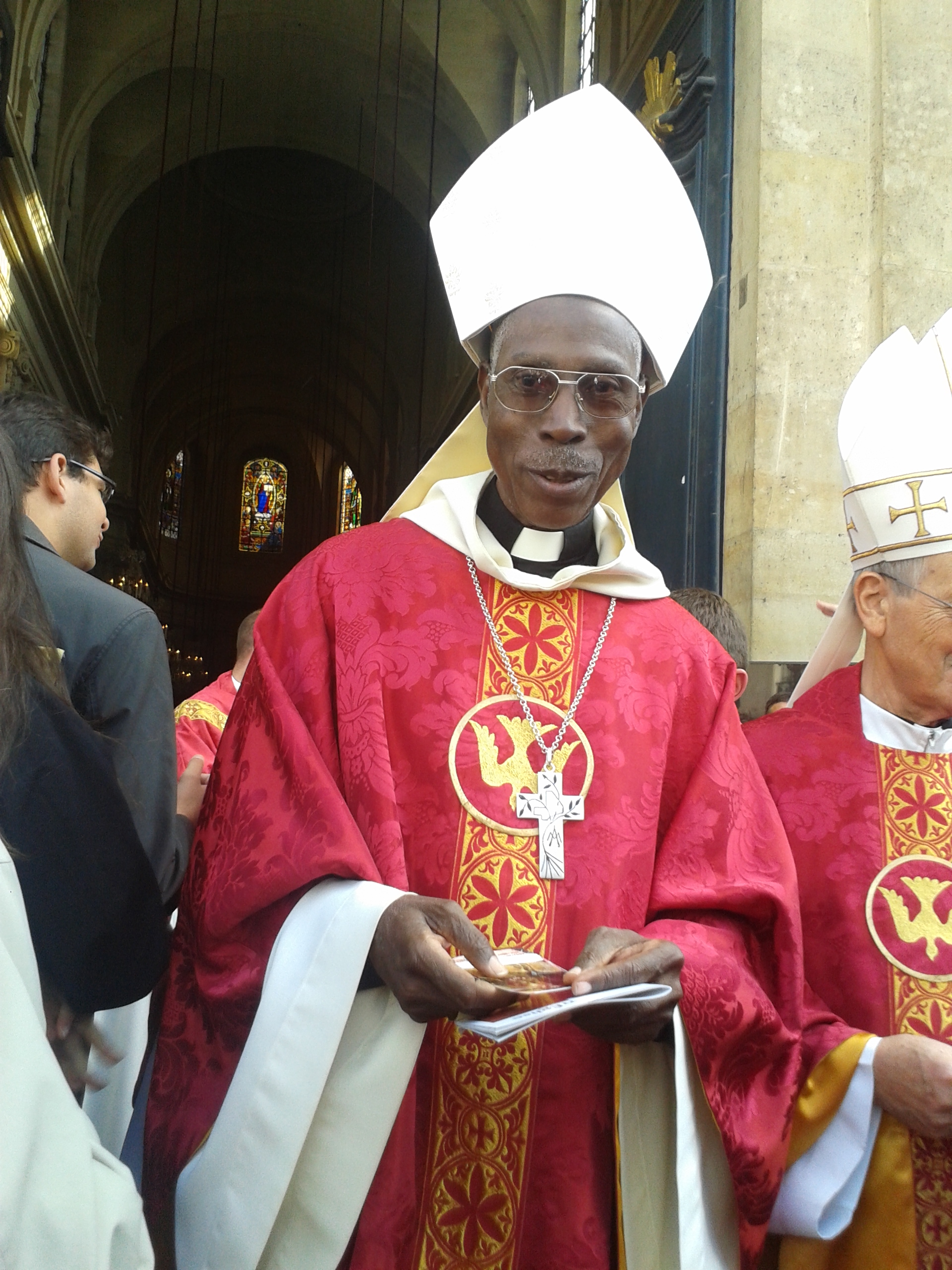 Mgr Jean-Gabriel Diarra sortant de la Cathédrale Saint-Louis de Versailles après les ordinations presbytérales du 29 juin 2014.